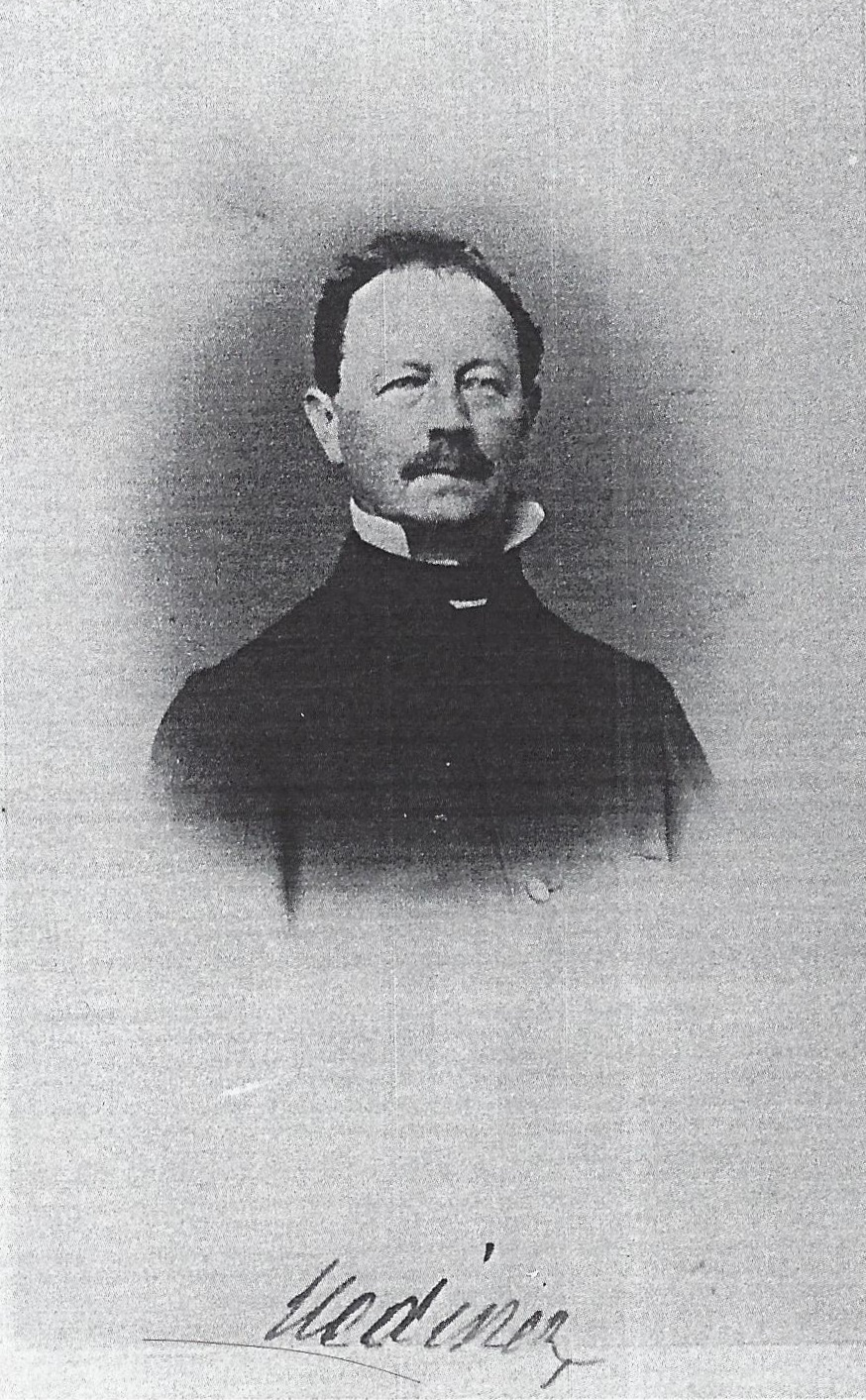 Signierte Porträtfotografie von August Uedinck (1811-1868)